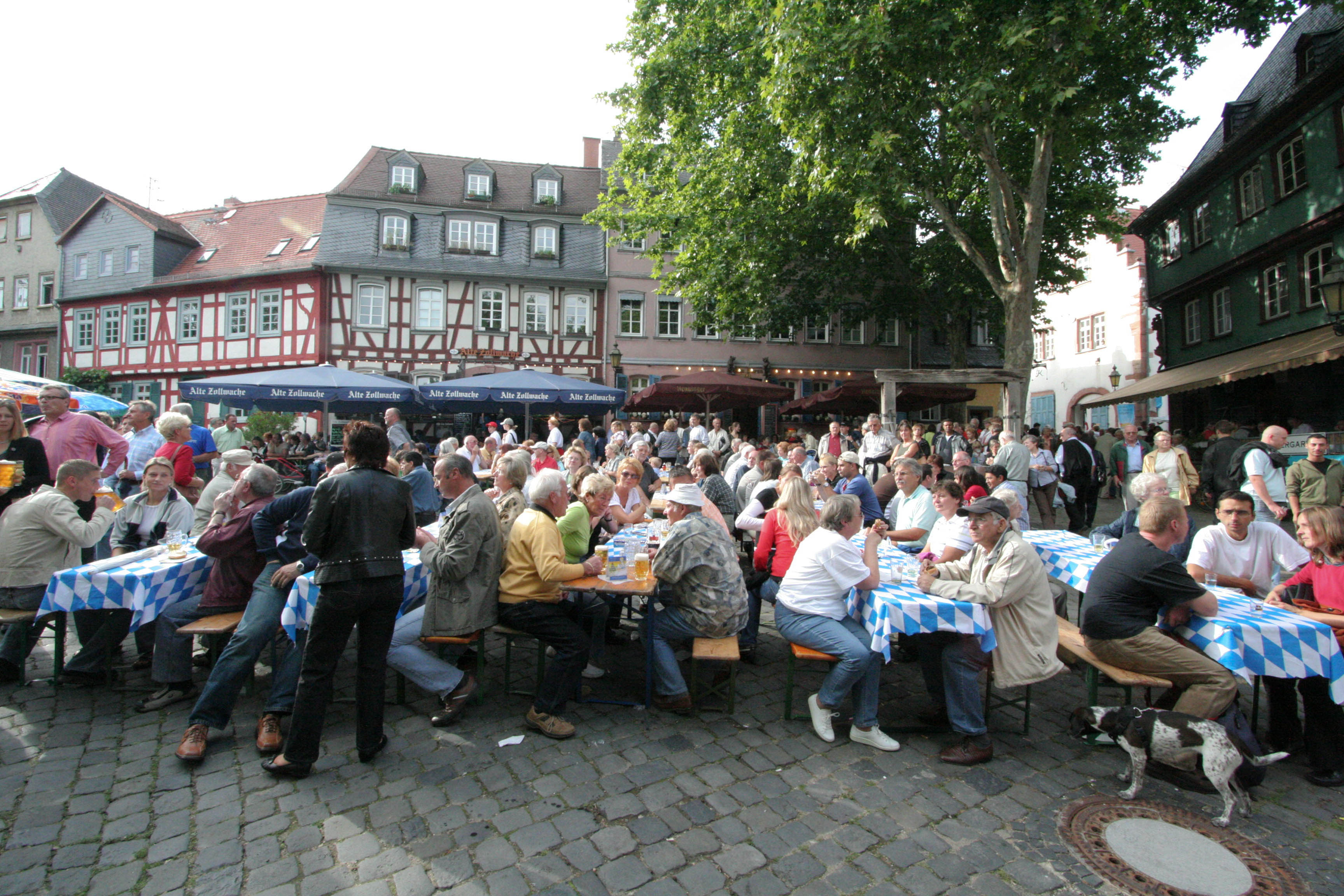 Schlossfest in Höchst (Frankfurt), Schlossplatz